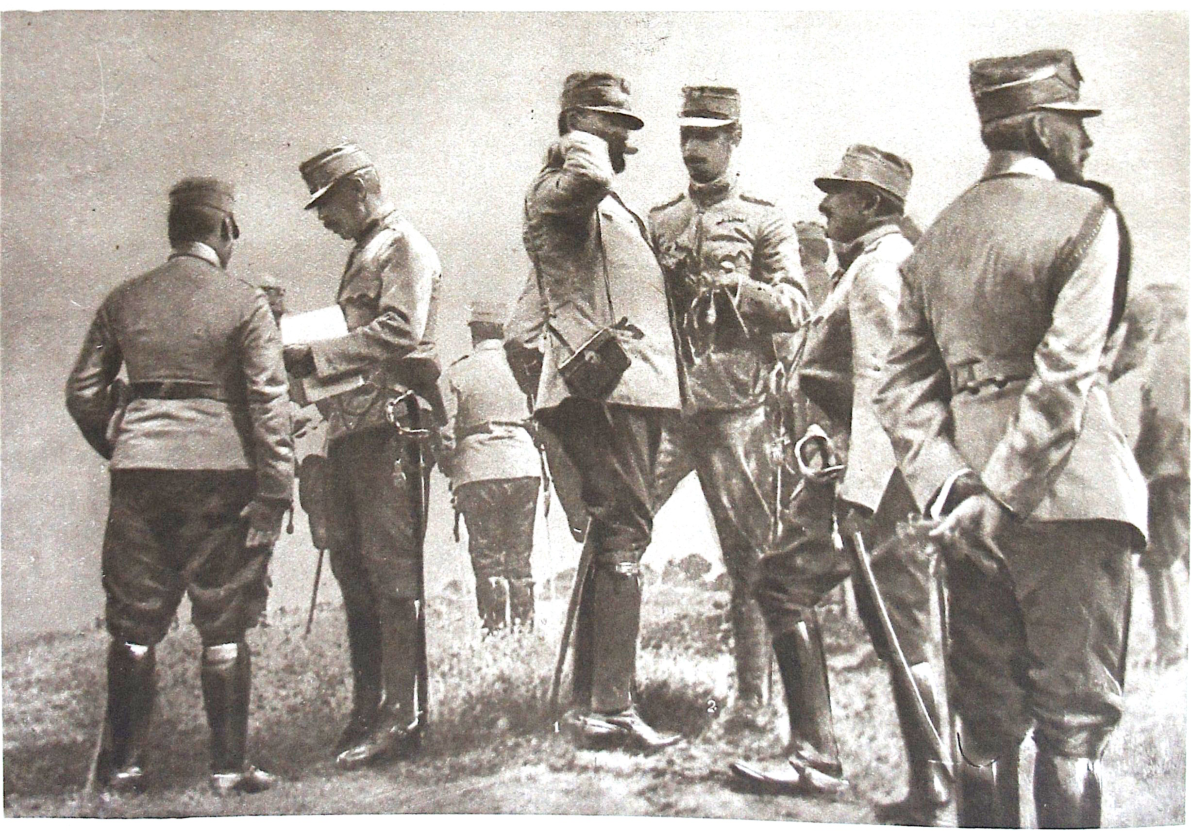 publié dans le journal "le miroir".